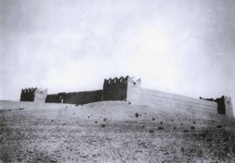 صورة القصر الأحمر عام 1928. Licensing مصدر